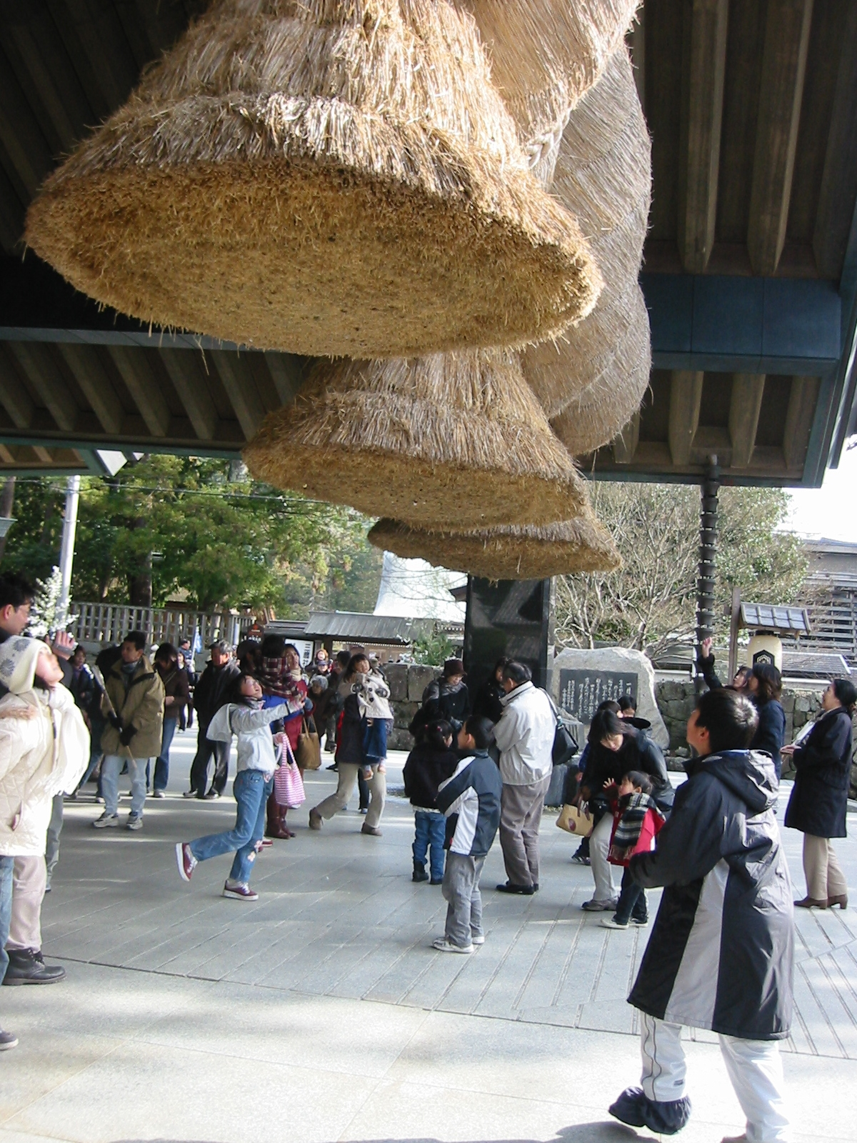 出雲大社 注連縄に向かって賽銭を挟むと良いことがある・・・らしい、十円は（遠縁）とうえんなのでだめらしいとガイドさんが